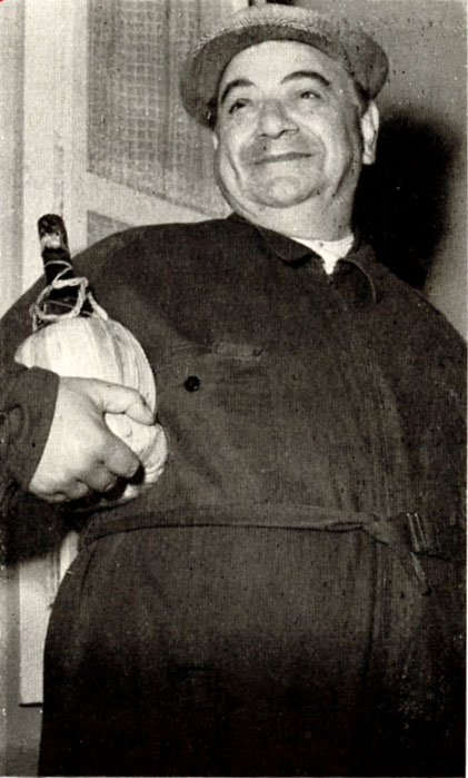 photo from Cineguida 1953